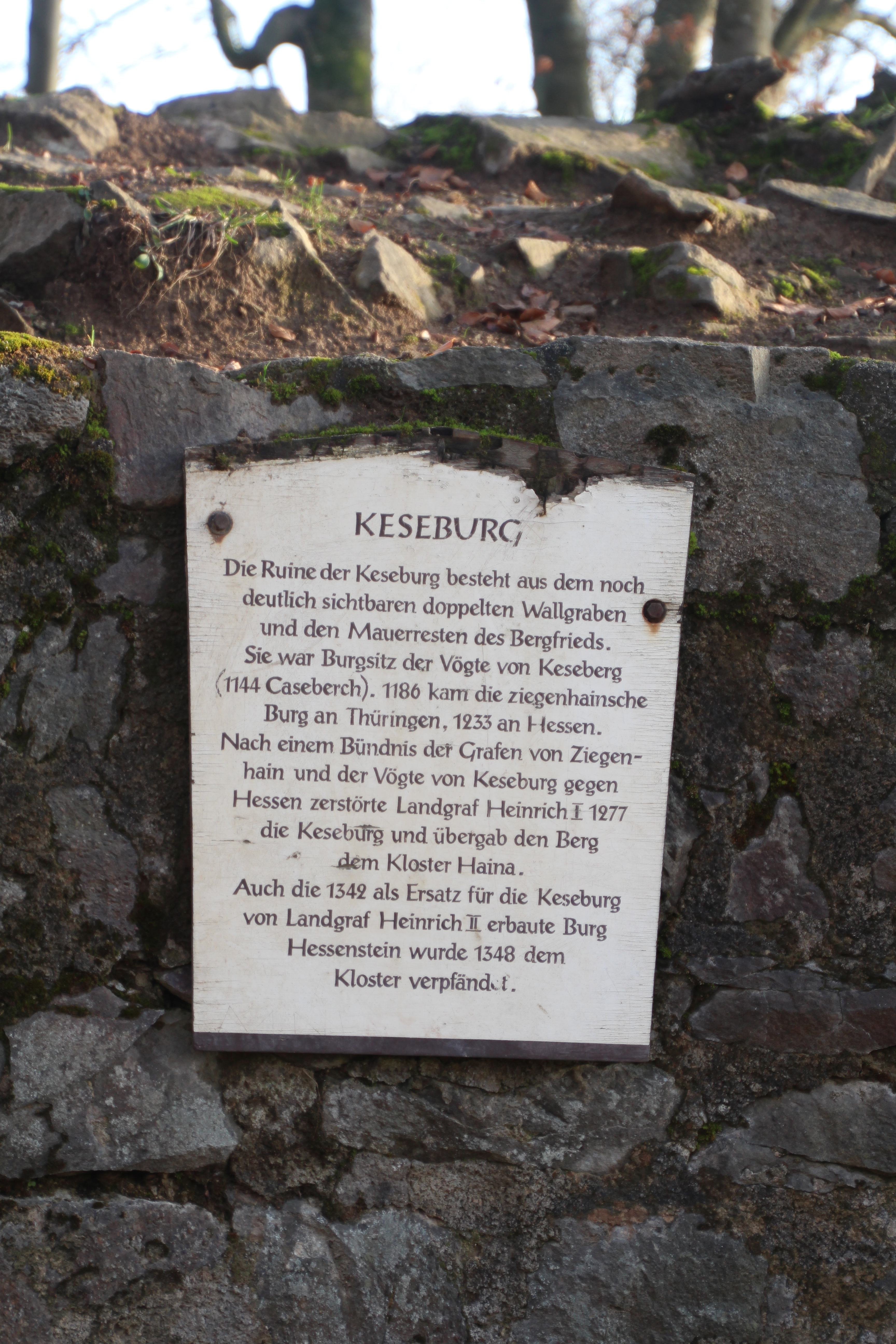 Siehe Bild und Dateiname